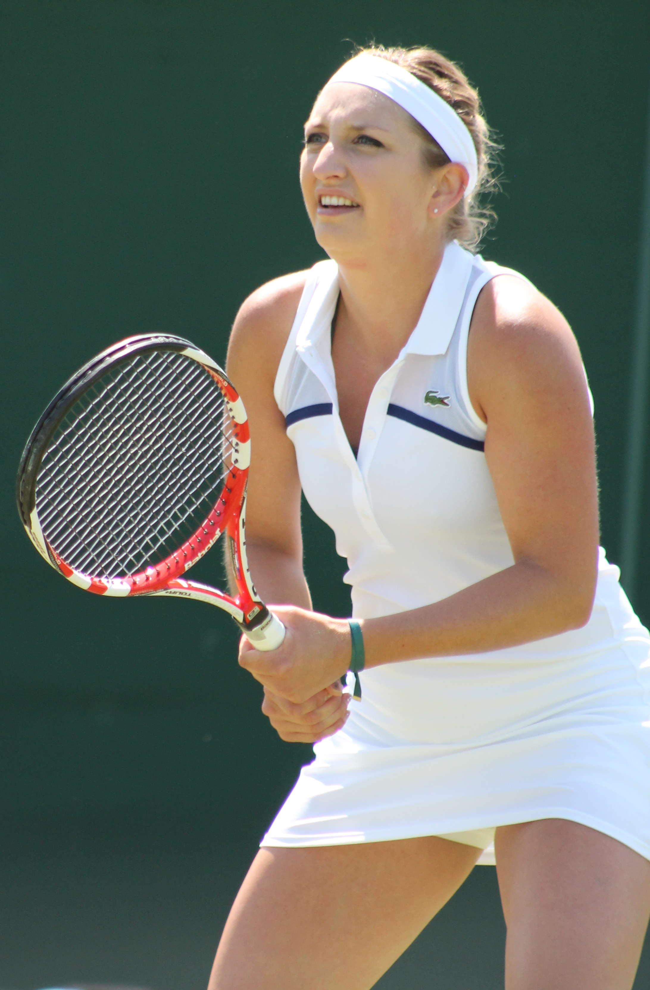 Bacsinszky WMQ14 (1)